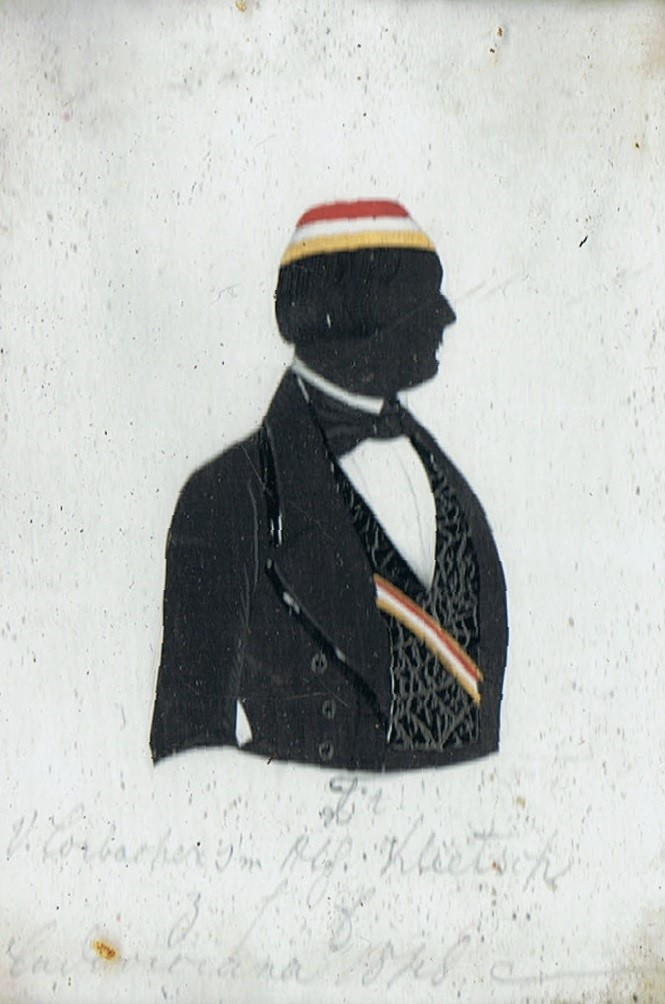 Kolorierter Schattenriss mit Widmung von Valentin Lorbacher